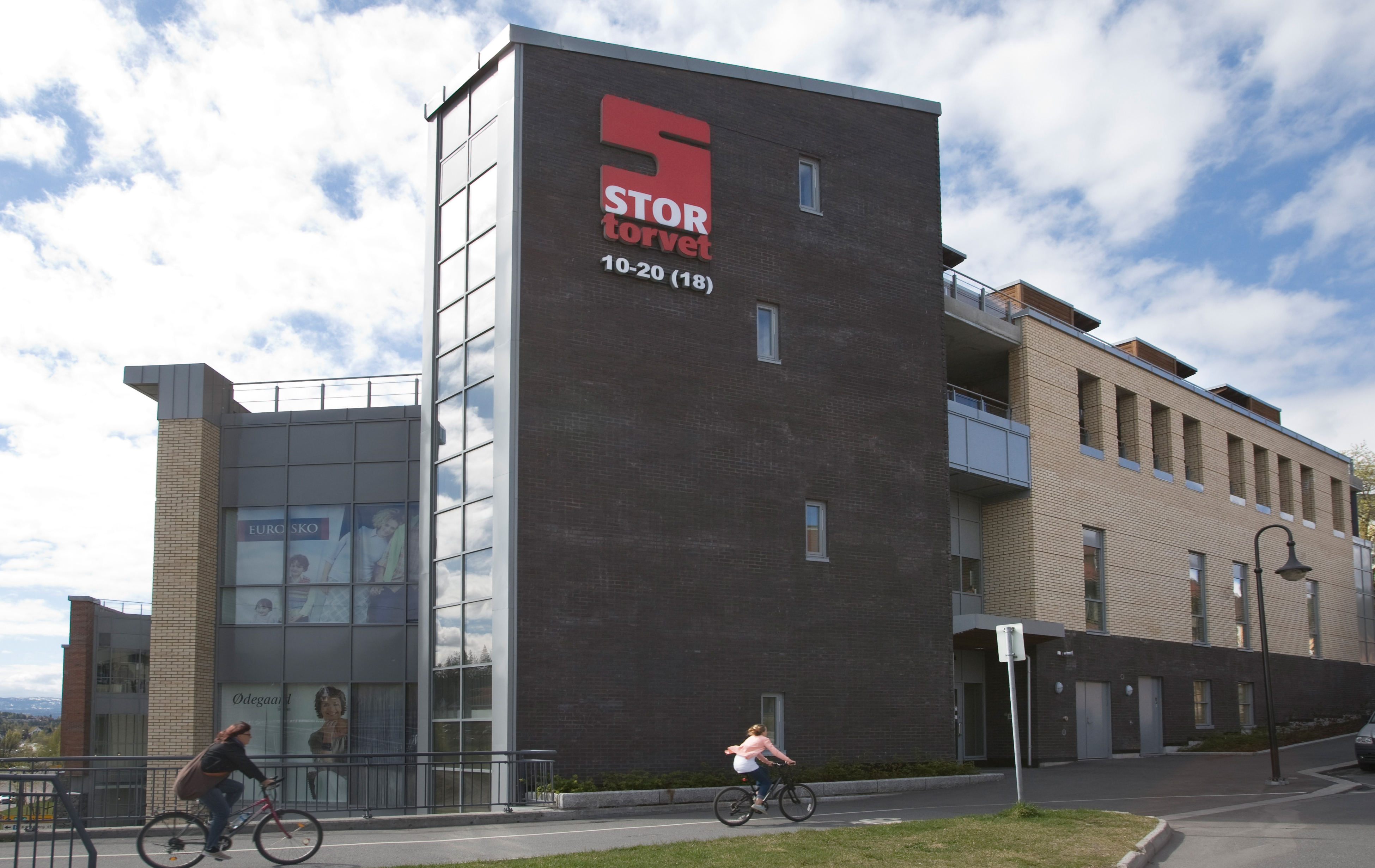 Stortorvets fasade mot Knutepunktet